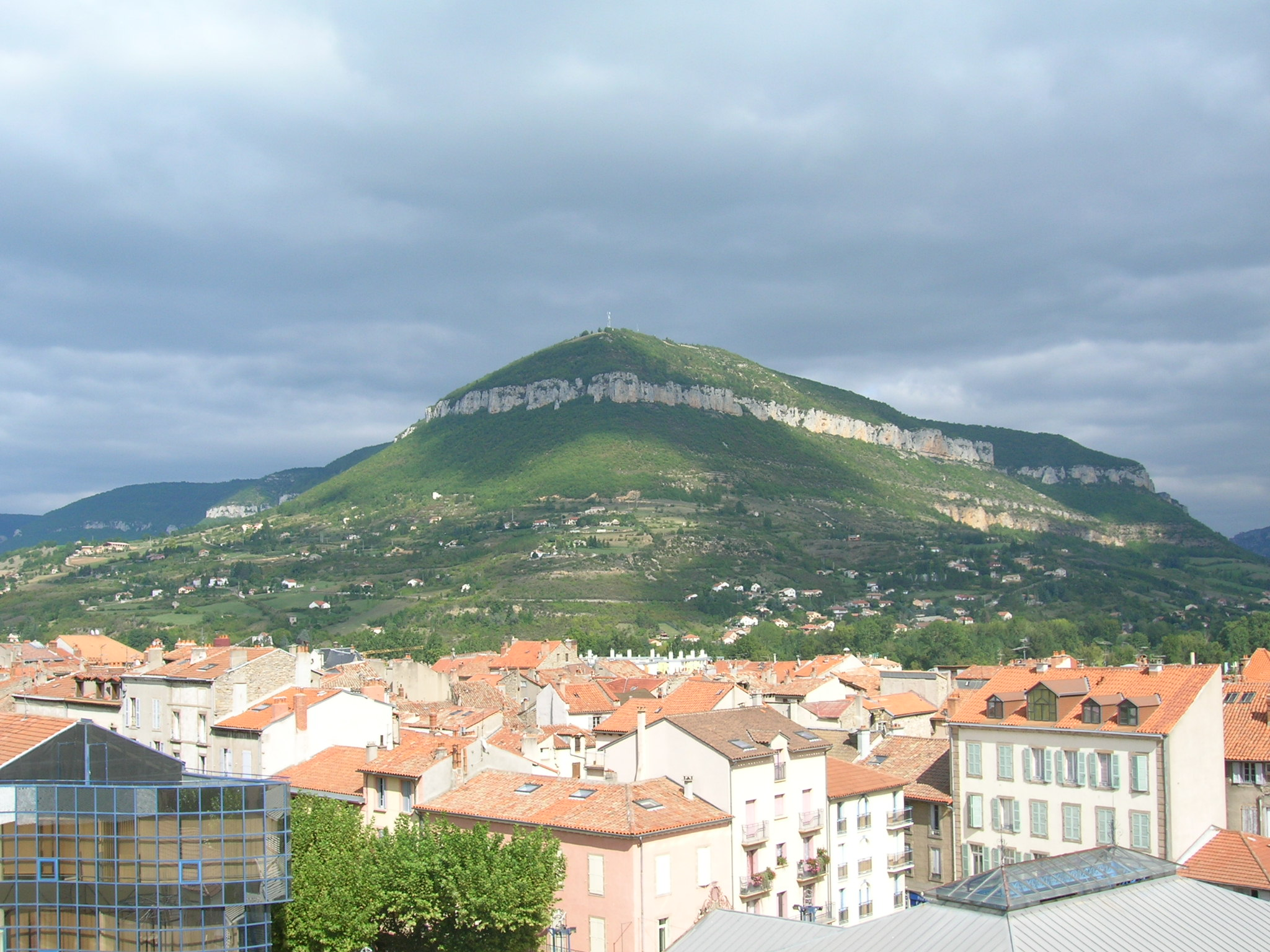 La puncho d'agast vue depuis le haut du beffroi.